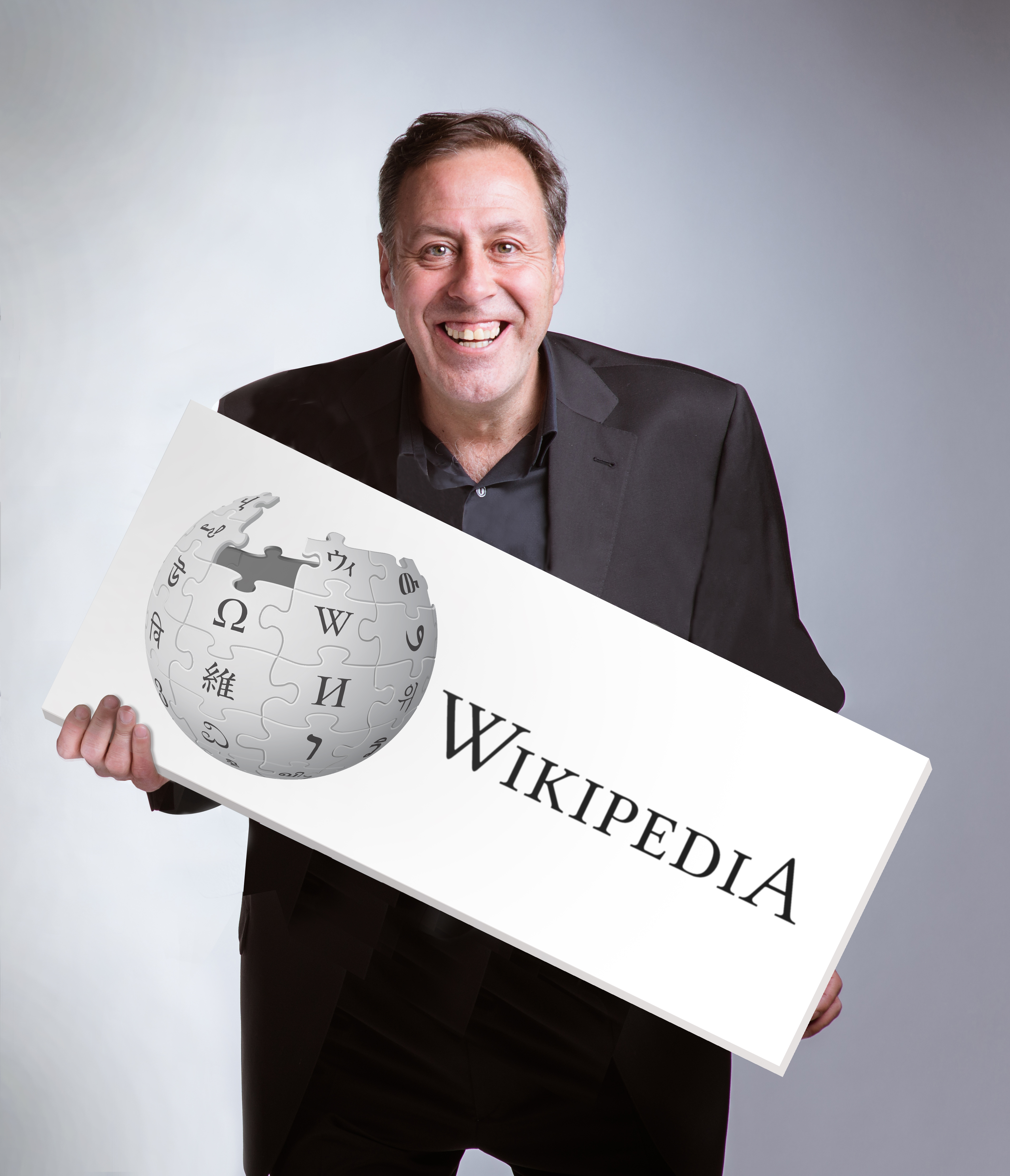 Sinacio